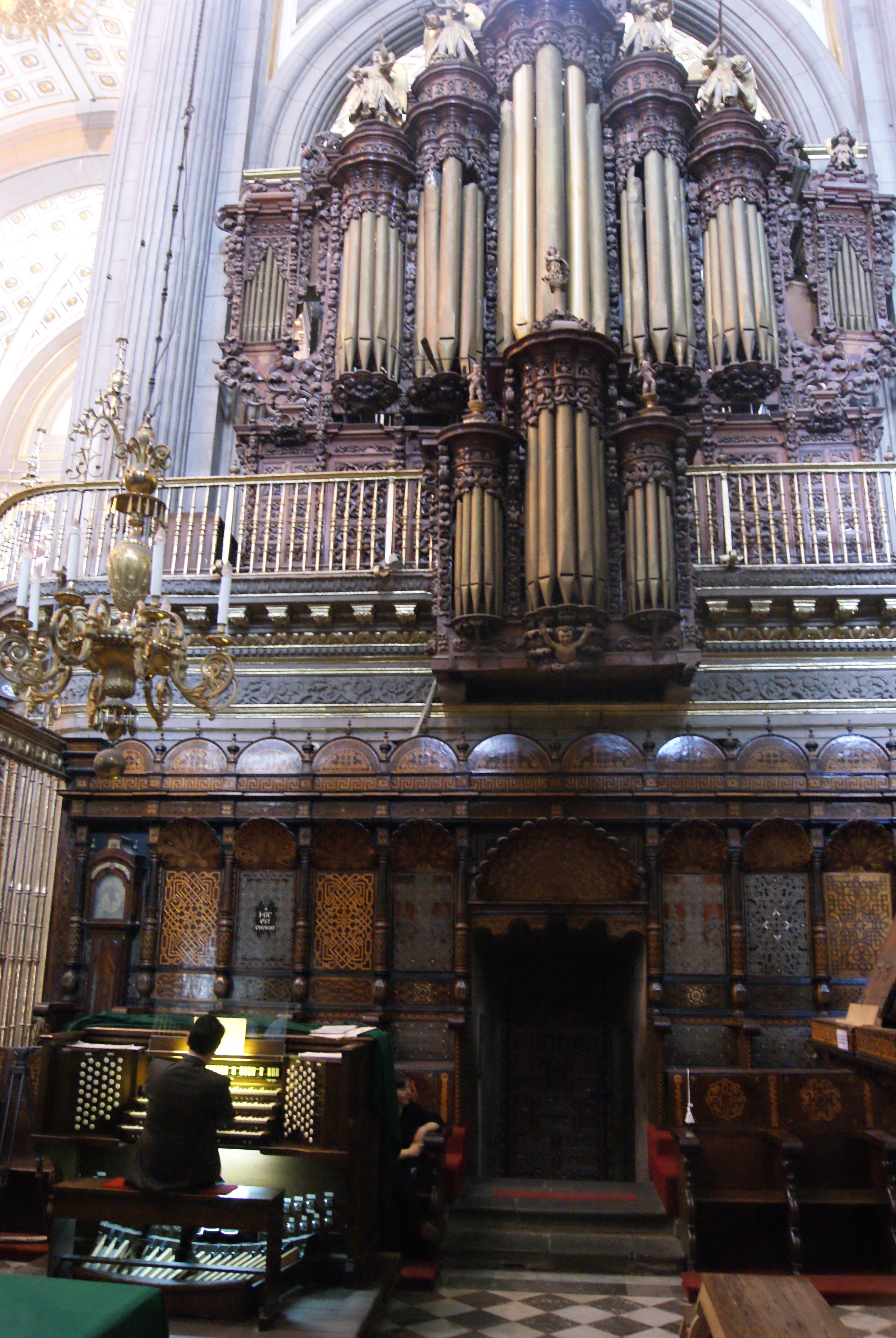 Gustavo Delgado Parra en concierto en el órgano de la Catedral de Puebla, durante el Festival Pasión 2010